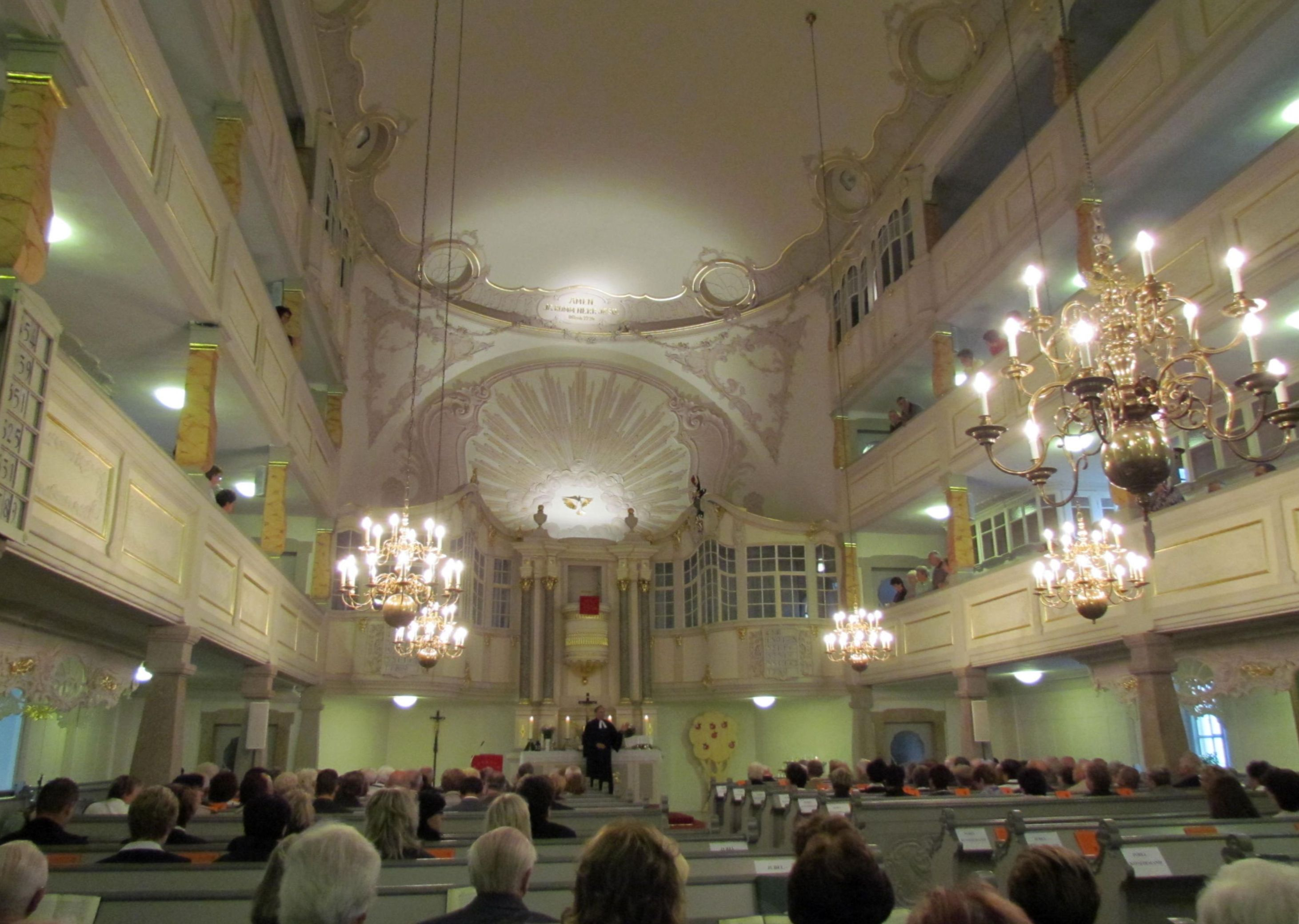 Schönheide im Erzgebirge: Blick nach Osten der nach Plänen von Christian Döltz von 1766 bis 1773 errichteten Saalkirche mit drei Emporen. Nach einem großen Umbau 1902/3 wurde das Innere 1964 renoviert. Eine Restaurierung in den 2000er Jahren machte einige der puristischen Übermalungen der 1960er Jahre rückgängig und stellte die frühere Farbgebung wieder her. Auch nach dem Umbau am Anfang des 20. Jahrhunderts blieb die Rokoko-Ausstattung weitgehend erhalten. Die hölzernen Säulen der Emporen sind sorgfältig marmoriert, um den Eindruck der Verwendung von Marmor zu erwecken. Nach der Fertigstellung des Baus 1773 zog sich der Innenausbau bis 1790 hin, die Malerarbeiten wurden erst 1835 beendet. Die lange Zeit für Bau, Ausbau und Ausmalung hatte ihren Grund in der finanziellen Enge der Kirchengemeinde, die ihren Kirchenbau ohne hohe Verschuldung errichten wollte. Der Messingleuchter im Vordergrund ist datiert auf das Jahr 1708. Die Namen der Spender sind auf einer am Leuchter angebrachten Tafel mit diesem Text aufgeführt: "Diesen Leuchter haben gestifft Folgende Personen wie sie hier aufgeZeugnet sindt den 13. October 1708 gen. Schonheyde Adam Gerisch Peter Leistner Georg Oschatz Christoph Gerisch Christian Gerisch Adam Schwab Christian Heydenfelder Christoph Schlesinger Christian Schlesinger Michael Schlesinger Oswaldt Unger Esaias Meckel Melchior Meckel" Die anderen Messingleuchter dürften erst in der 2. Hälfte des 20. Jahrhunderts in die Kirche gekommen sein und zwei über dem Mittelgang hängende Leuchter von 1888 und 1896 ersetzt haben.